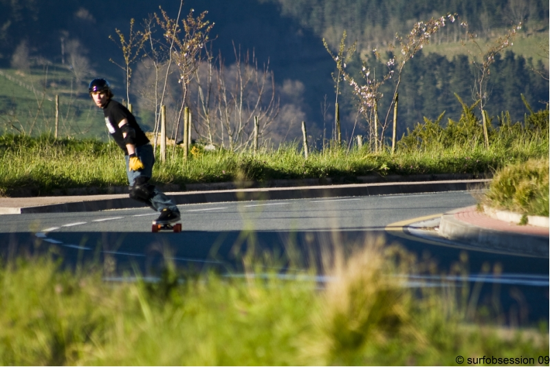 Skater practicando descenso